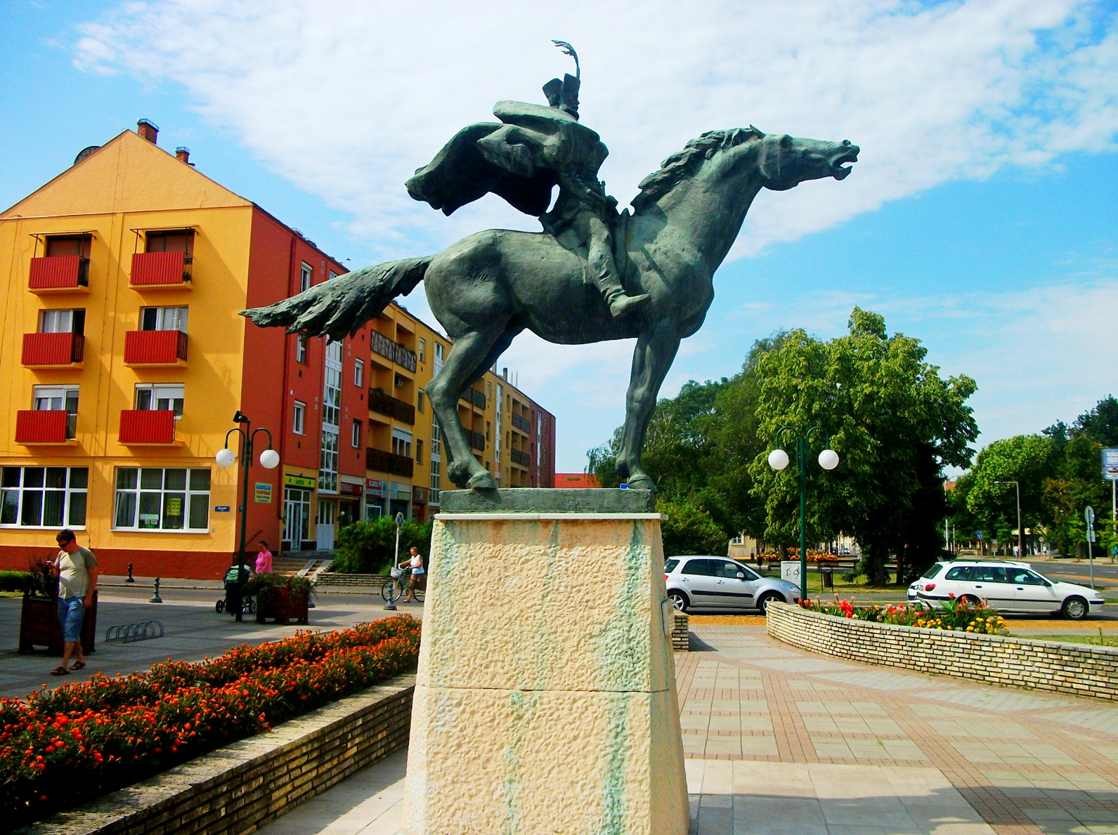 A szobor Hajdúszoboszlón, a Hősök terén található. 1972-ben avatták fel a szobrot, melynek alkotója Marton László.